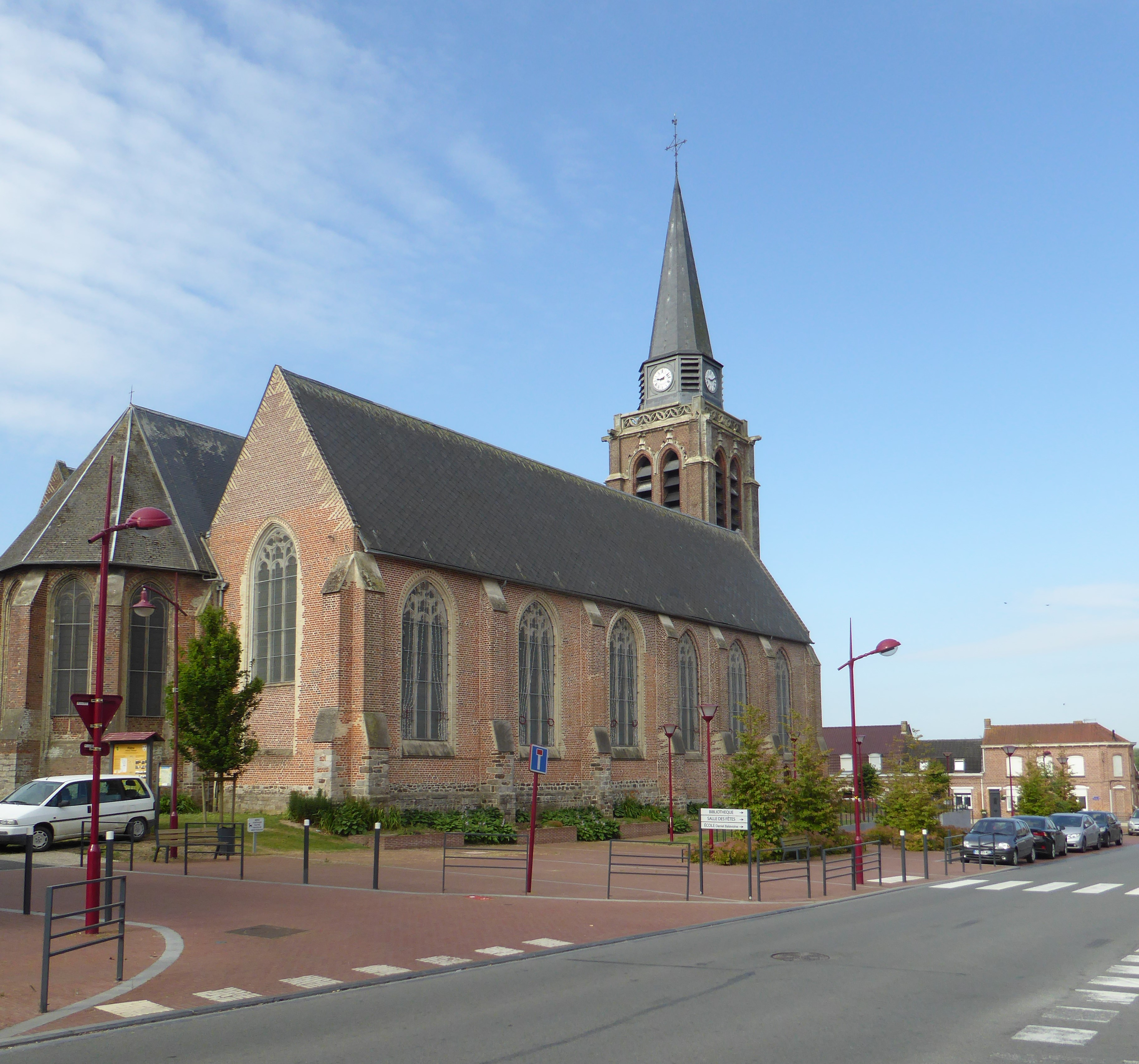 Église Saint-Matthieu Flêtre (Nord, France) .